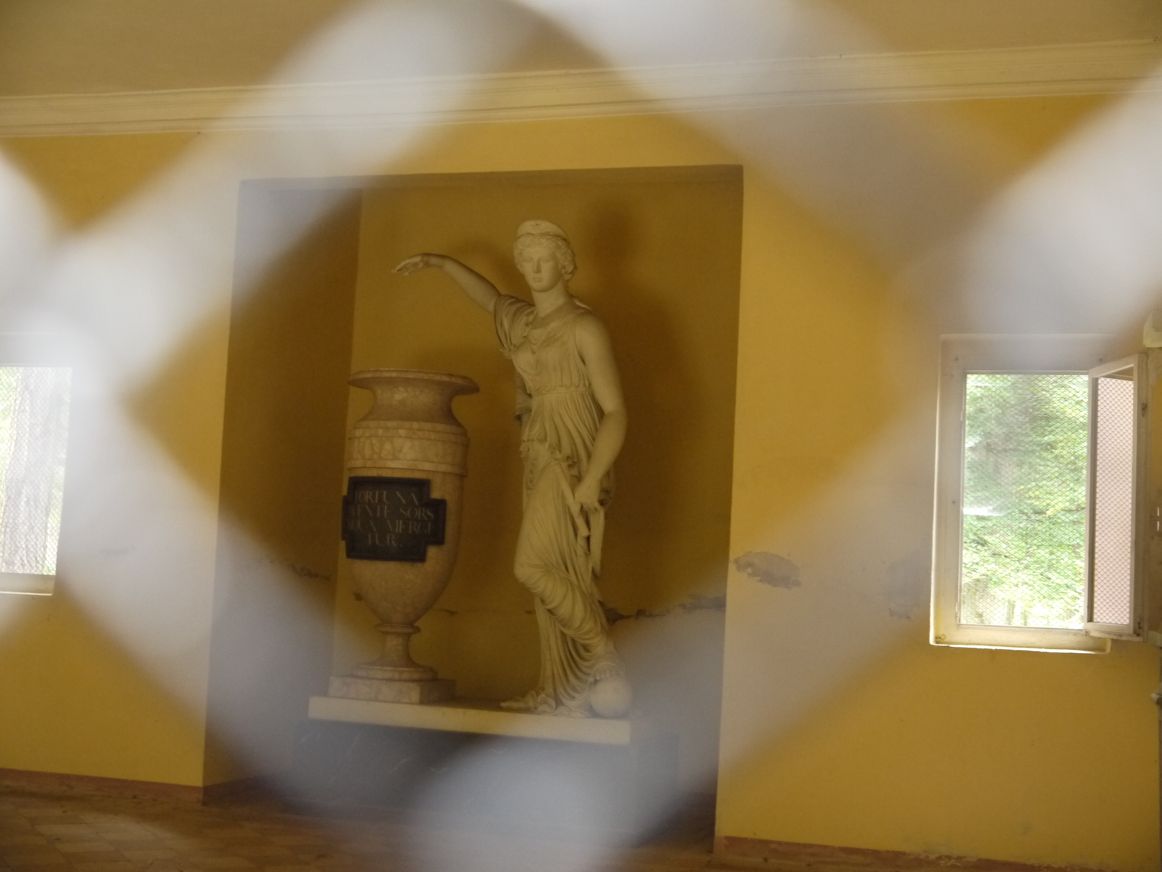 Statue des Fatums im Philosophenhaus im Park Schönbusch